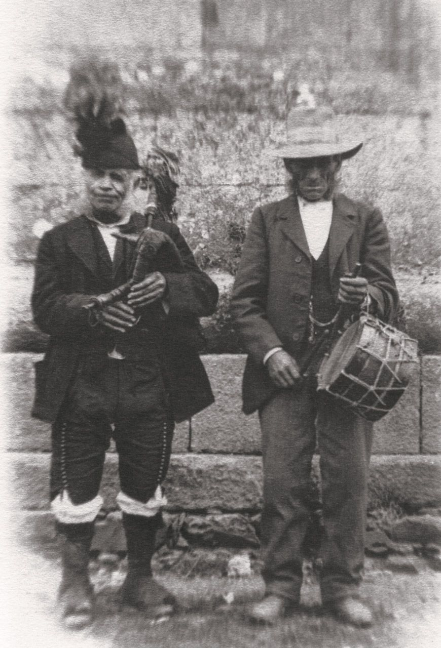 Fotografia de 1899 do gaiteiro Manuel Rilo Pardo "O Rilo de Betanzos" e do tamborileiro "O Vigo" de Parada.